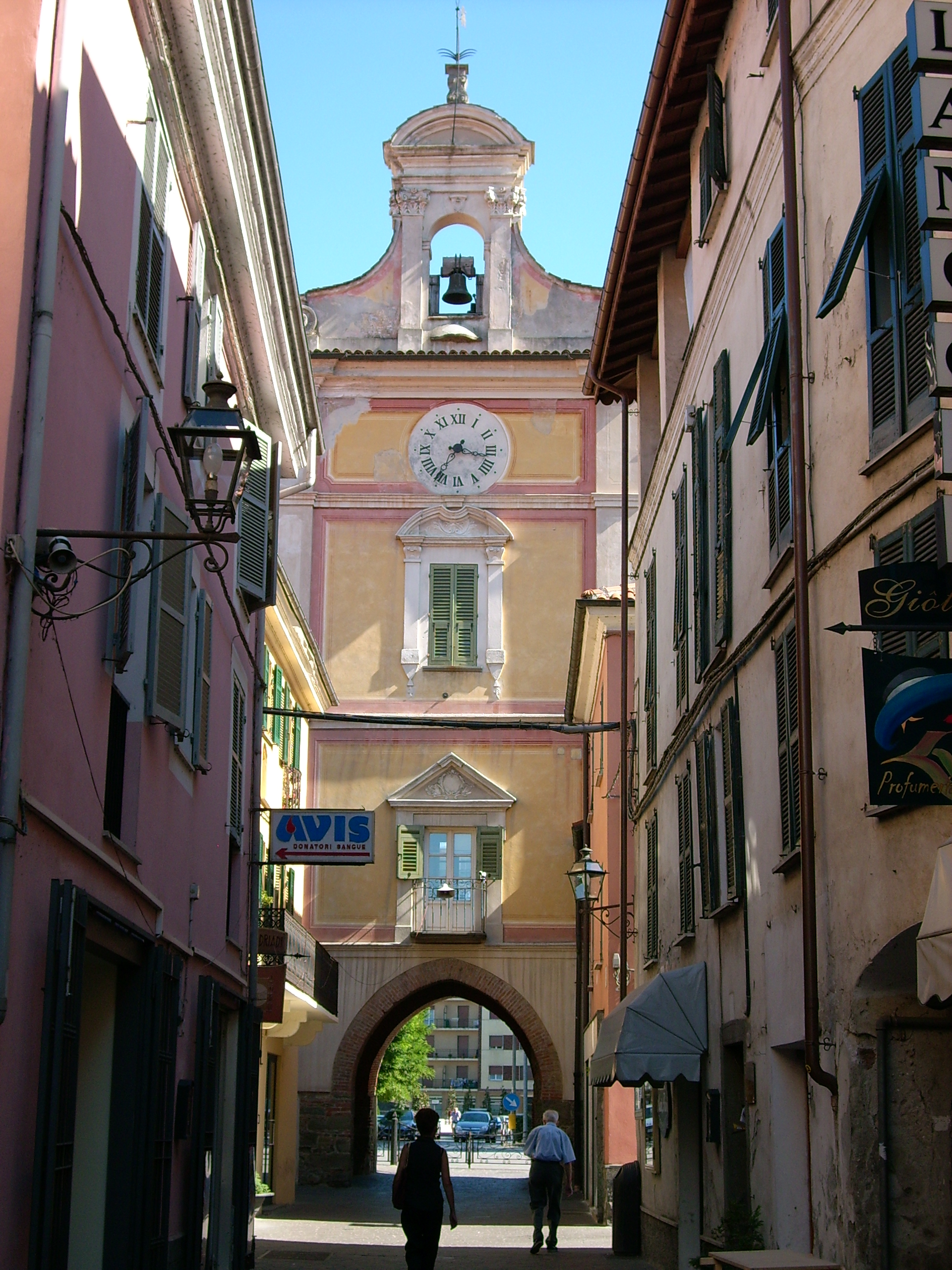 Cairo Montenotte, Liguria, Italia